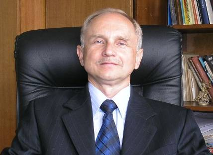 Хричиков Валерій Євгенович — академік АН вищої школи України